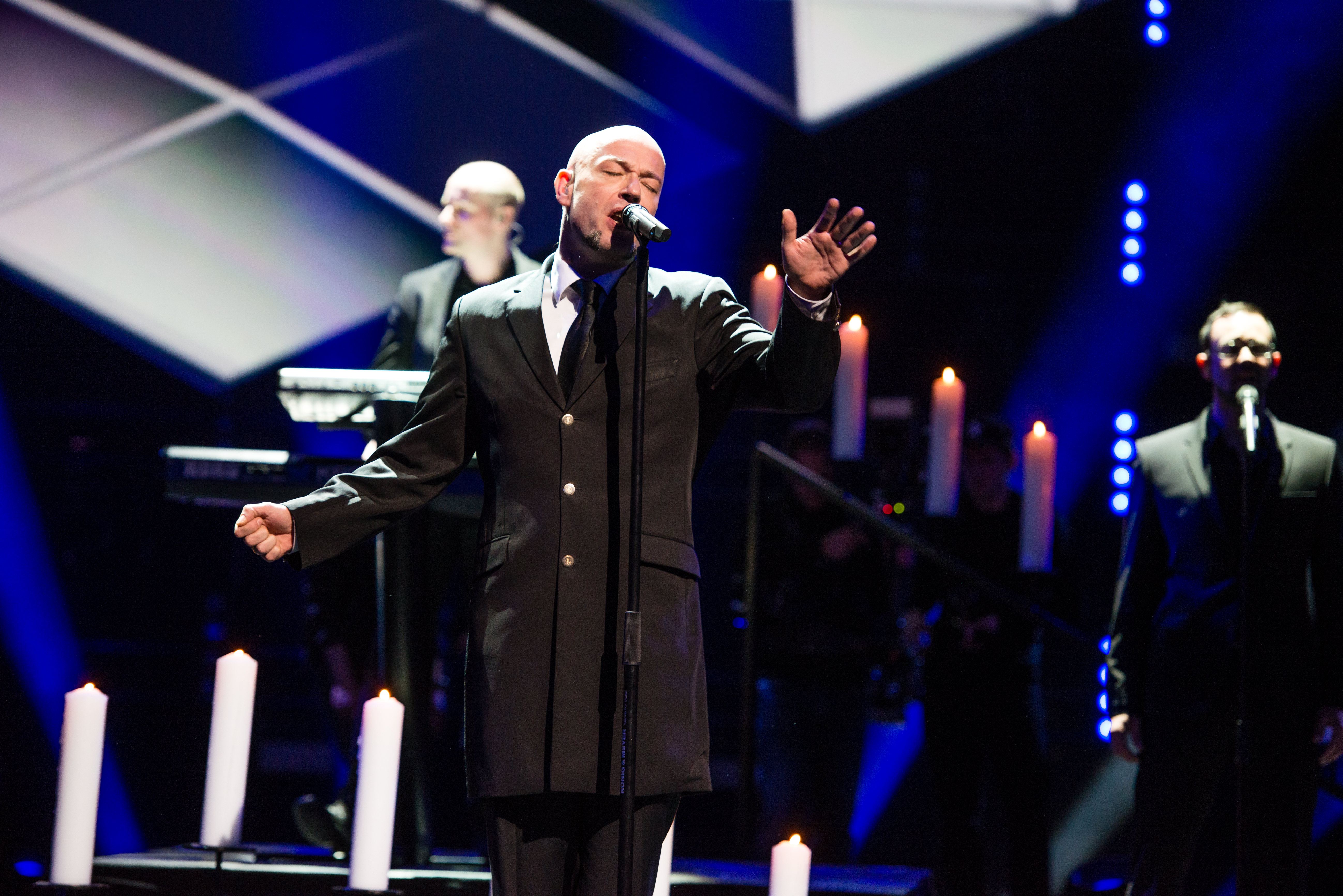 'Eurovision Song Contest 2014 - Unser Song für Dänemark': 'Unheilig'